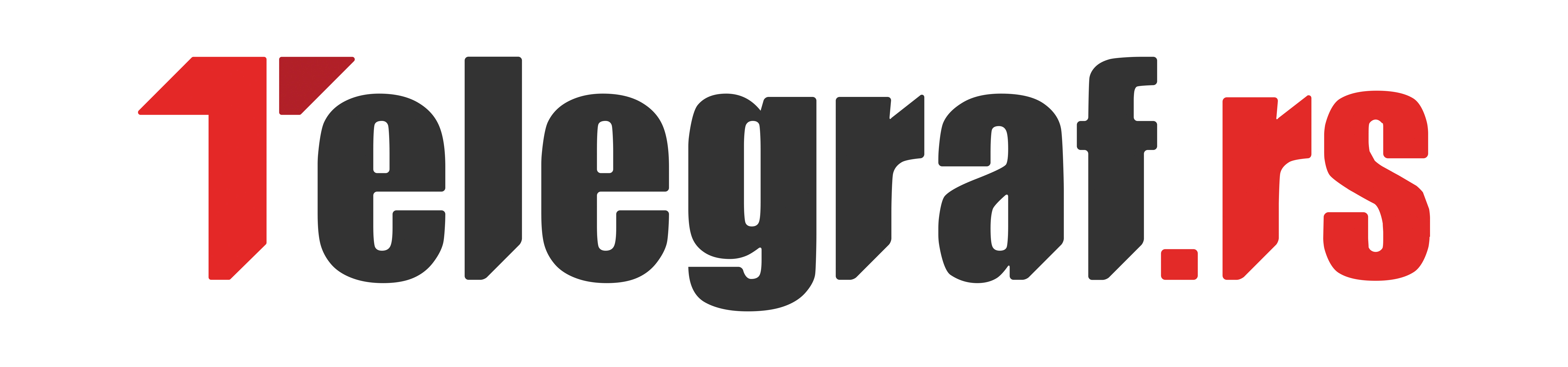 Informativno-zabavni portal Telegraf.rs